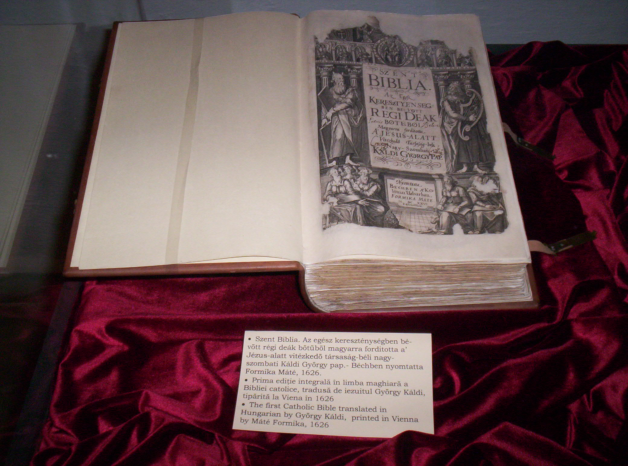 Káldi György Bibliafordítása 1626-ból (Csíki Székely Múzeum) – photo taken by uploader User:Csanády in 2006.